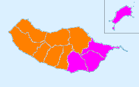 Mapa ilustrativo